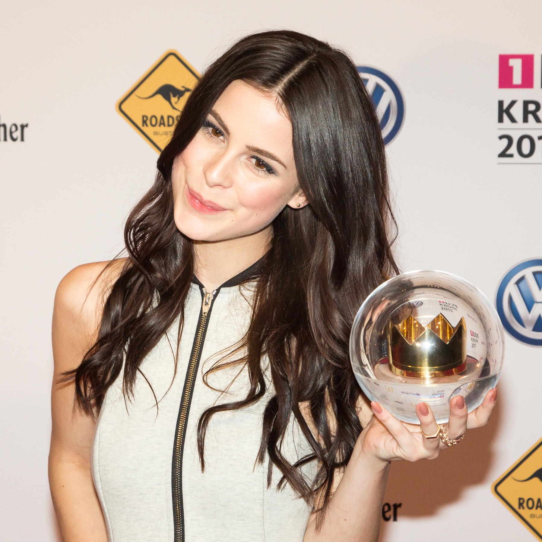 1lIVE Krone 2015 - Lena Meyer-Landrut